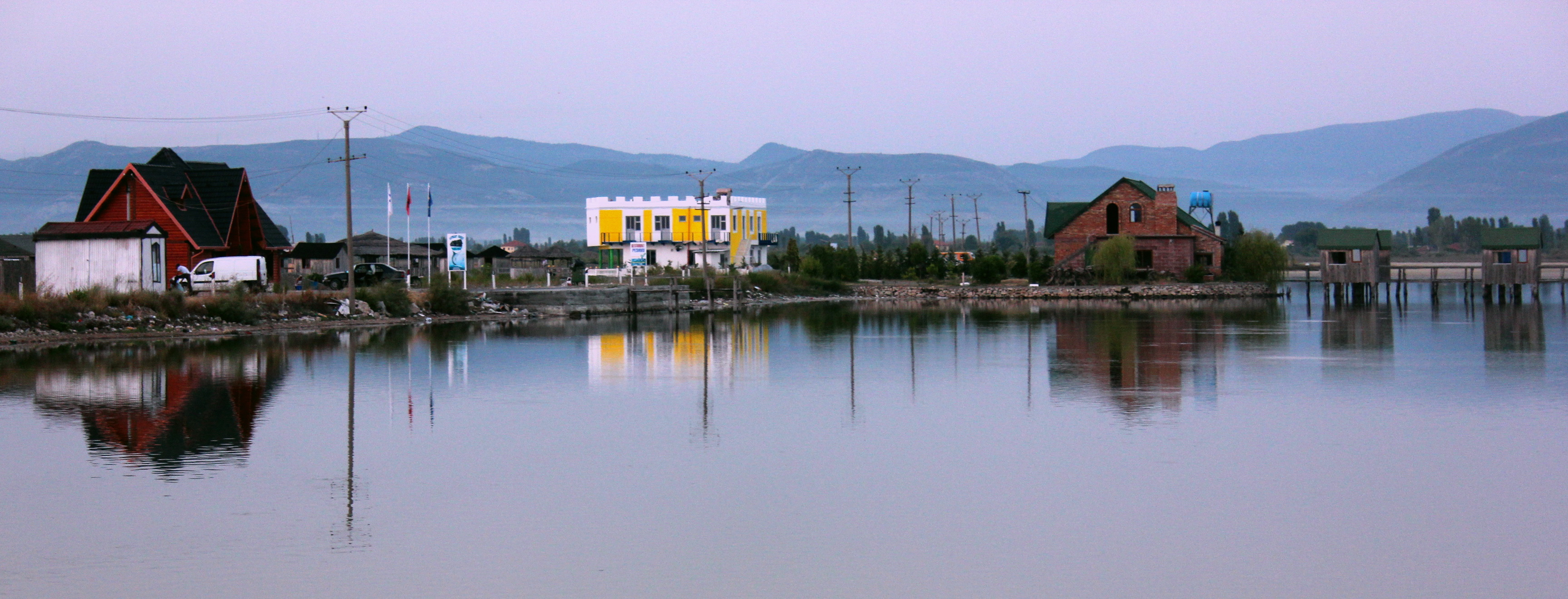 Fischrestaurants an der Straße auf dem Damm in der Lagune von Patok.